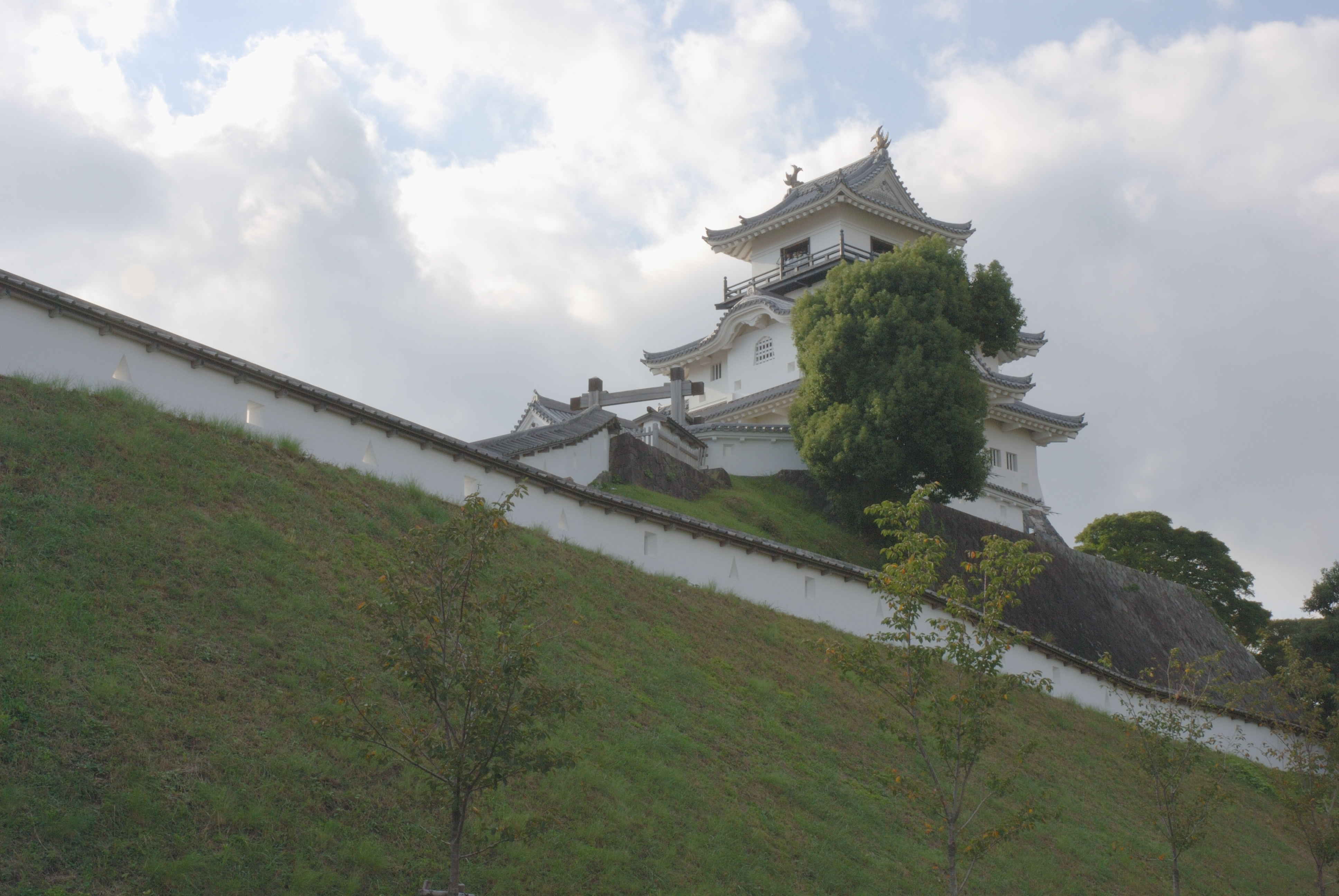 tenshu